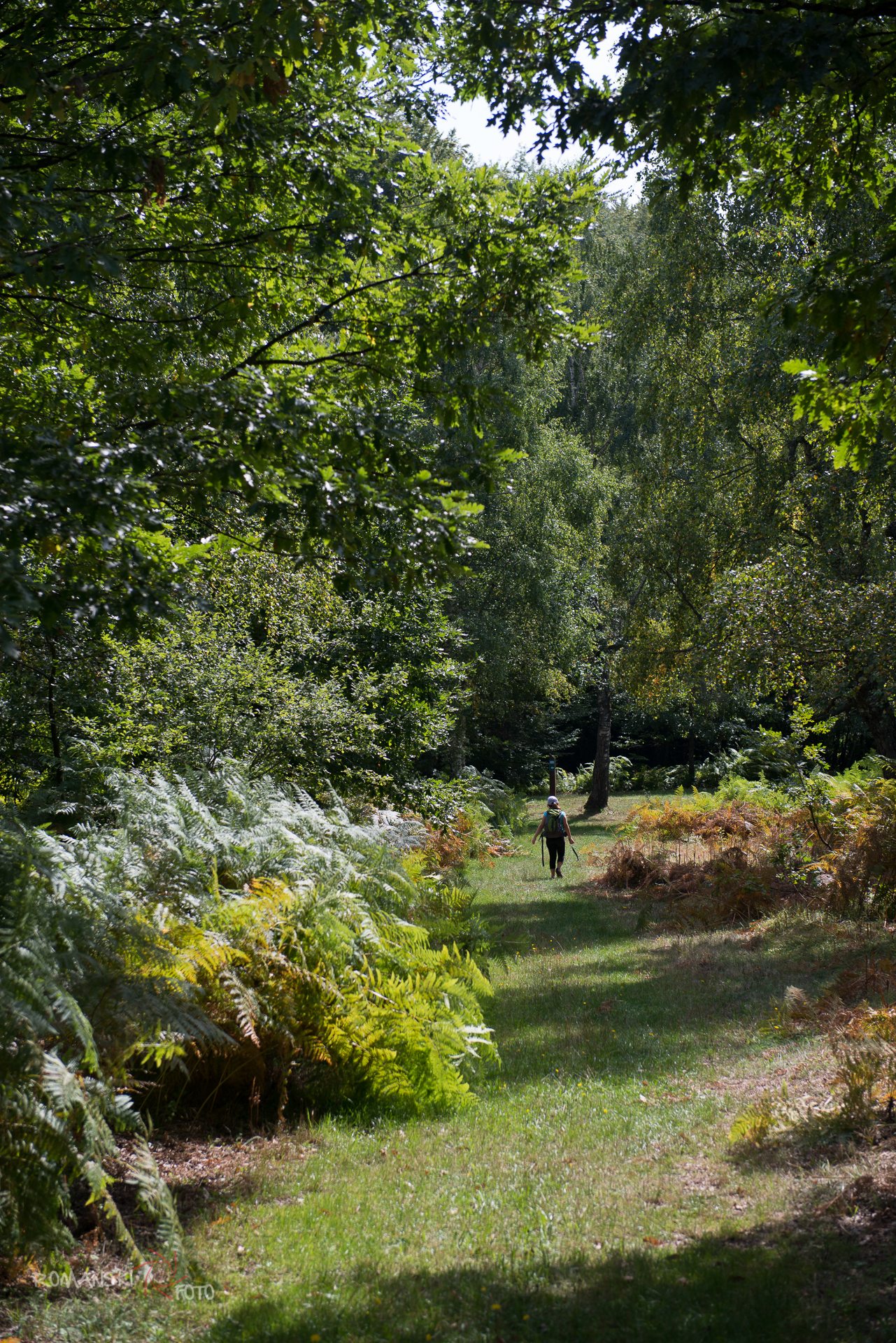 Arheološka staza Budinjak